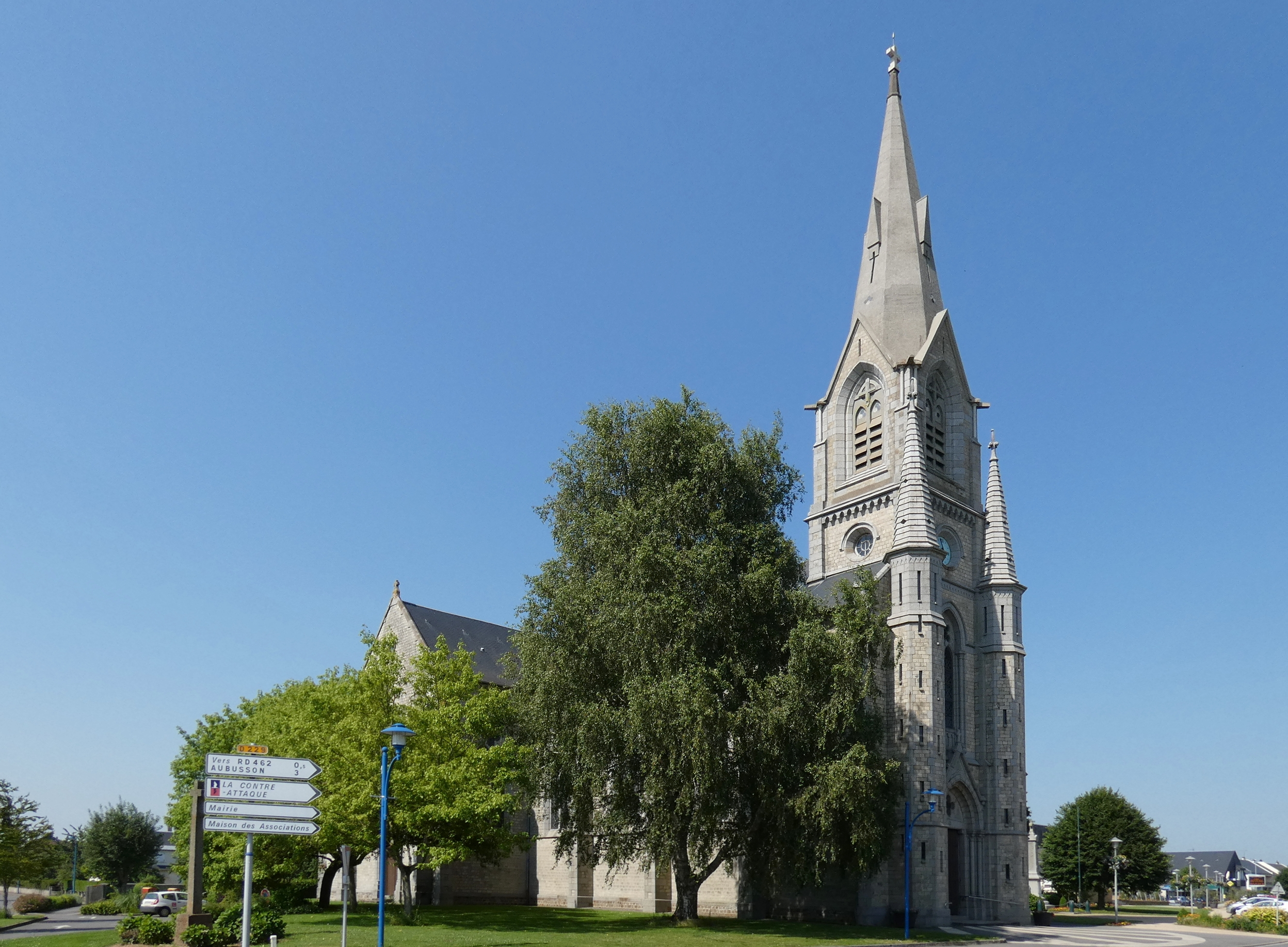 Saint-Georges-des-Groseillers (Normandie, France). L'église Saint-Georges.